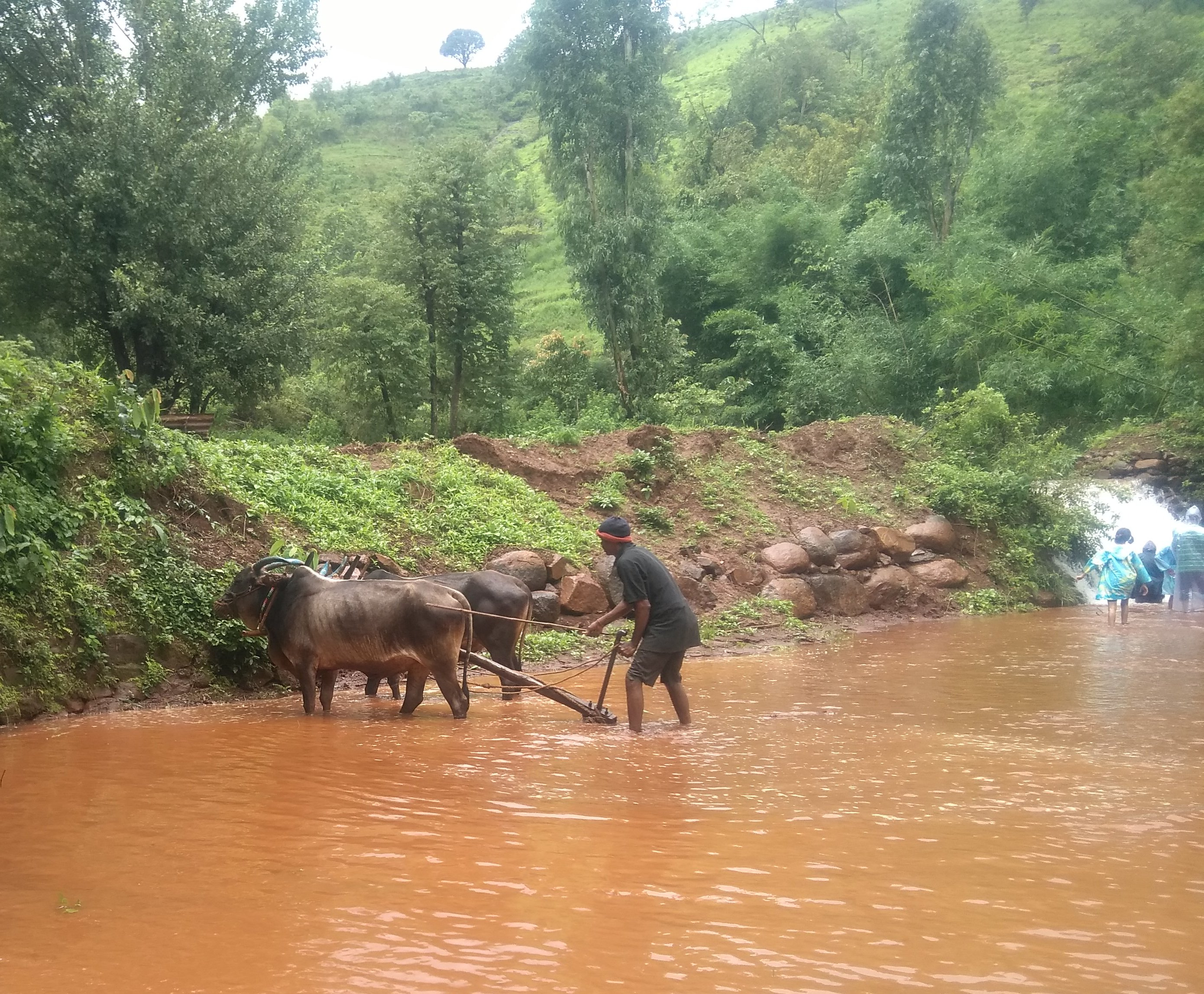 भात शेतातील औत